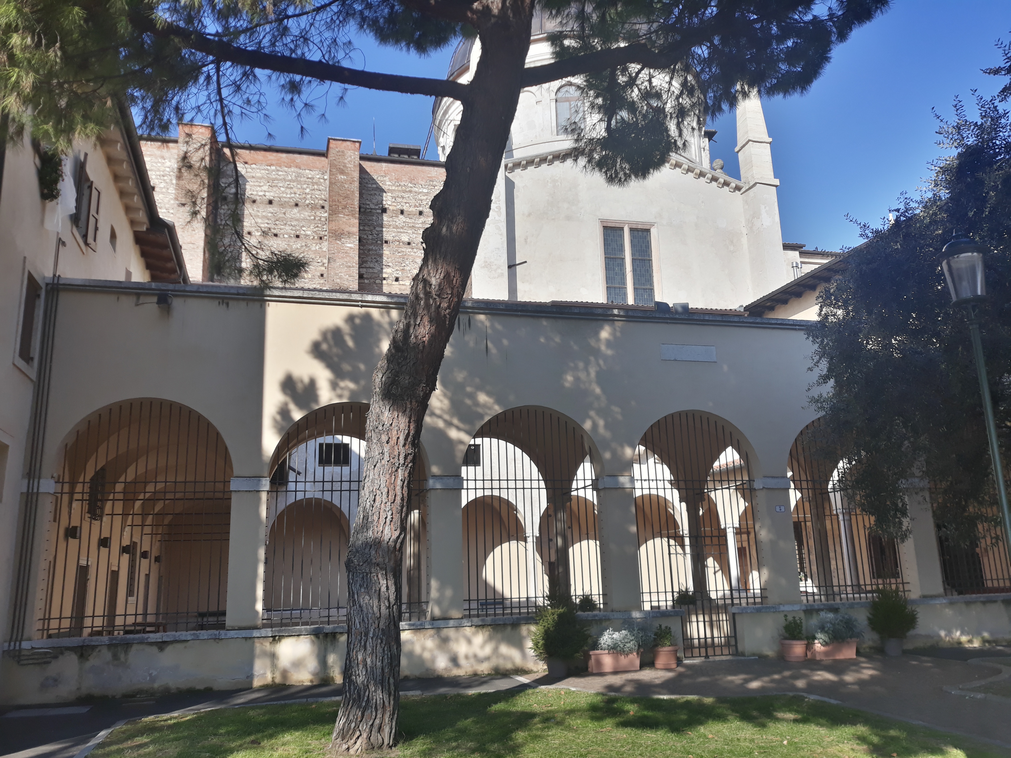 Chiosto cinquecentesco di san Giorgio in Braida